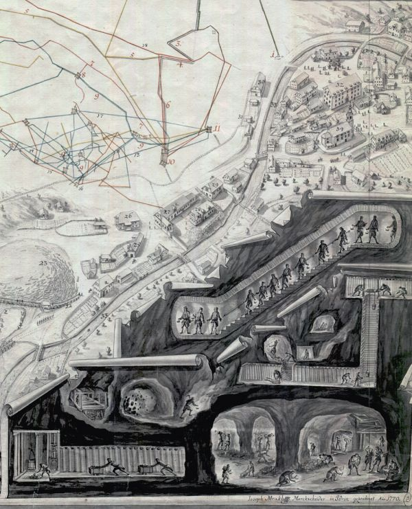 Skica idrijskega rudnika živega srebra in tloris Idrije